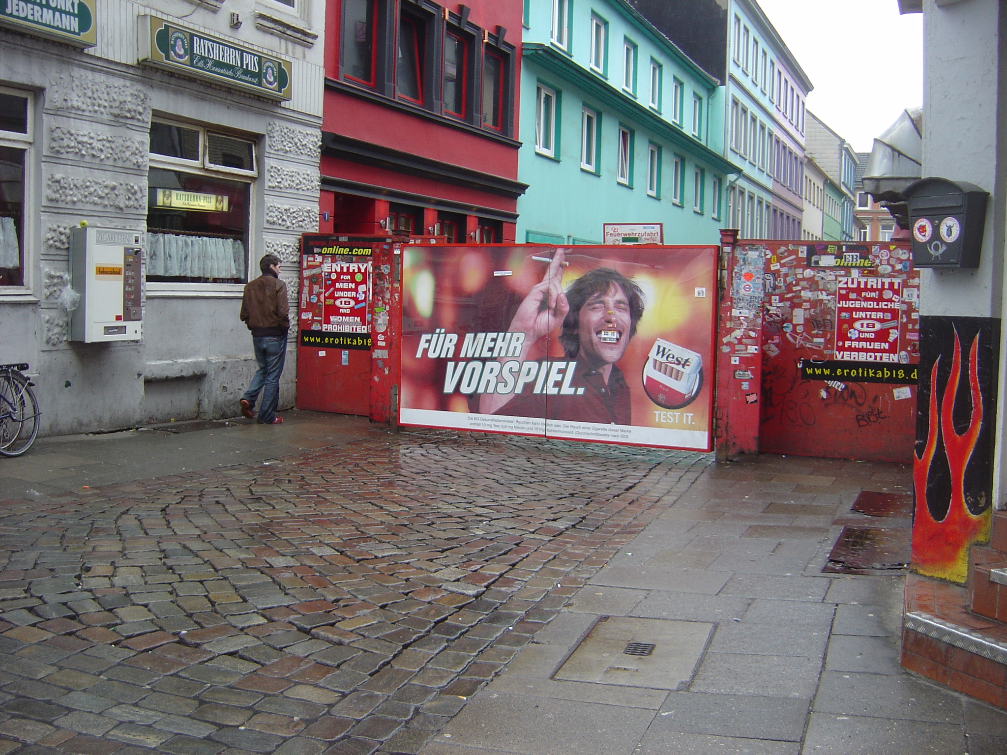 Eingang zur Herbertstraße in Hamburg-St. Pauli.